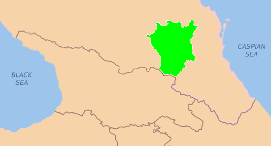 mapa no recococido por Rusia